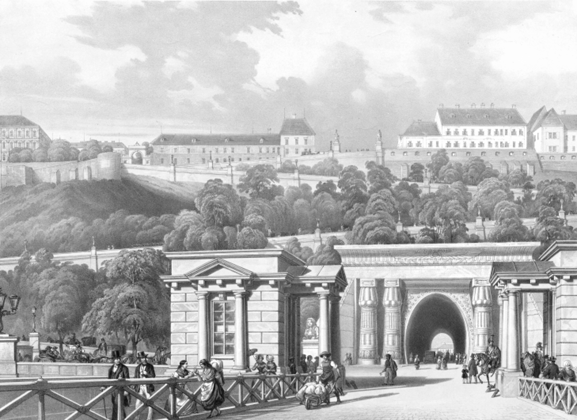 Budai Alagut. - Der Ofner-Tunnel. Beschreibung Der nach dem Entwurfe des Herrn Adam Clark zu unternehmende Bau dieses, durch den Ofner Festungsberg führenden Tunnels, ist die Aufgabe der, unter der Leitung des Hochwohlgebornen Herr Josef von Ürményi bestehenden "Ofner-Pester Tunnel Gesellschaft" Dieser Text ist auch in ungar. Sprache unterhalb der Ansicht zu lesen Lithografie, getont. Datierung um 1845. Digitale Sammlung Albertina-Vues